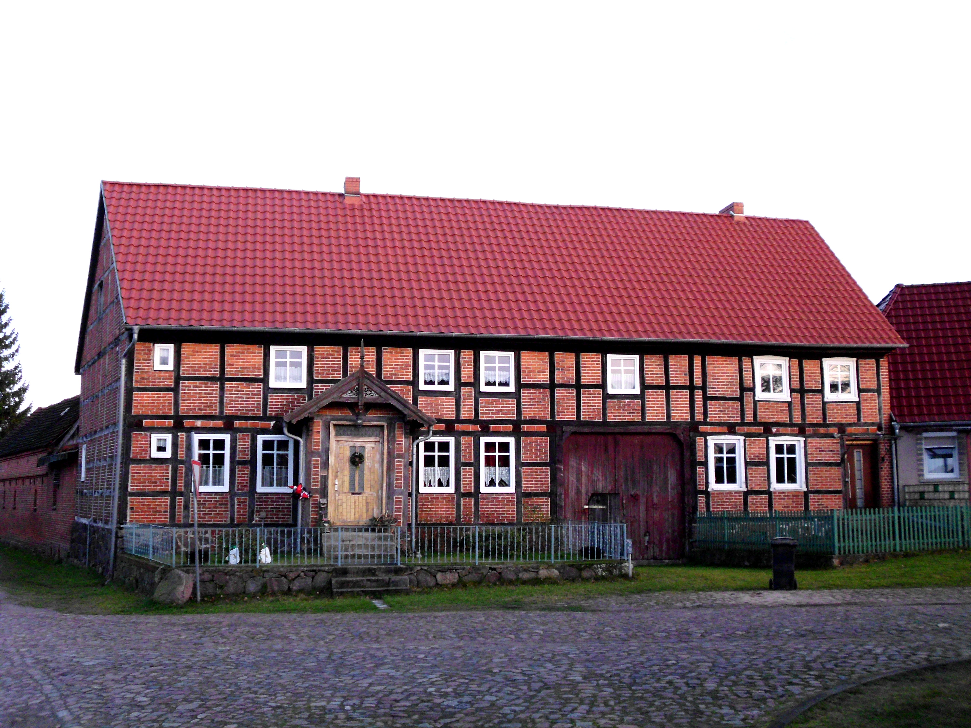 unter Denkmalschutz stehendes Gebäude Lindenstraße 2/3 in Rohlsdorf, Gemeinde Groß Pankow, Landkreis Prignitz